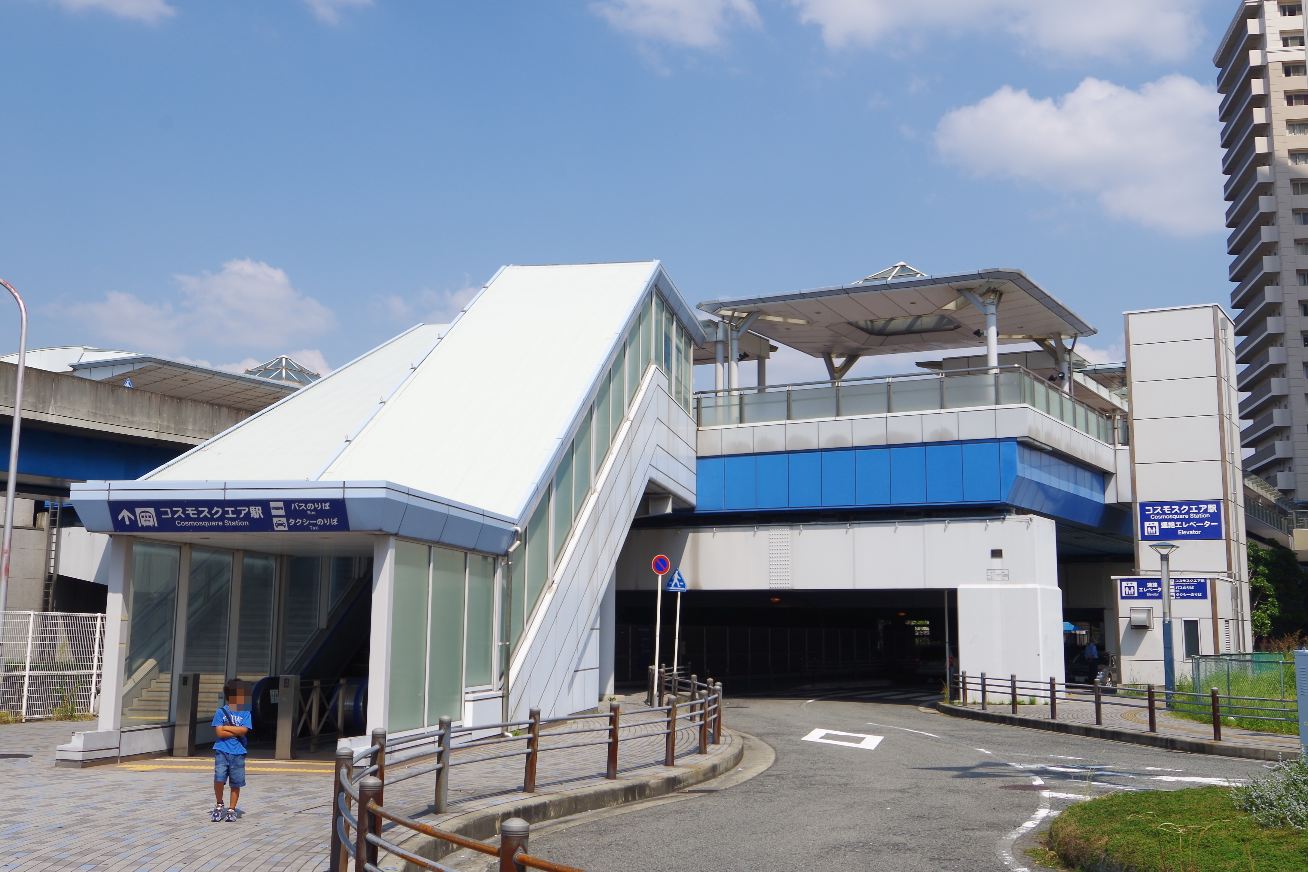 コスモスクエア駅前 2013.9.23